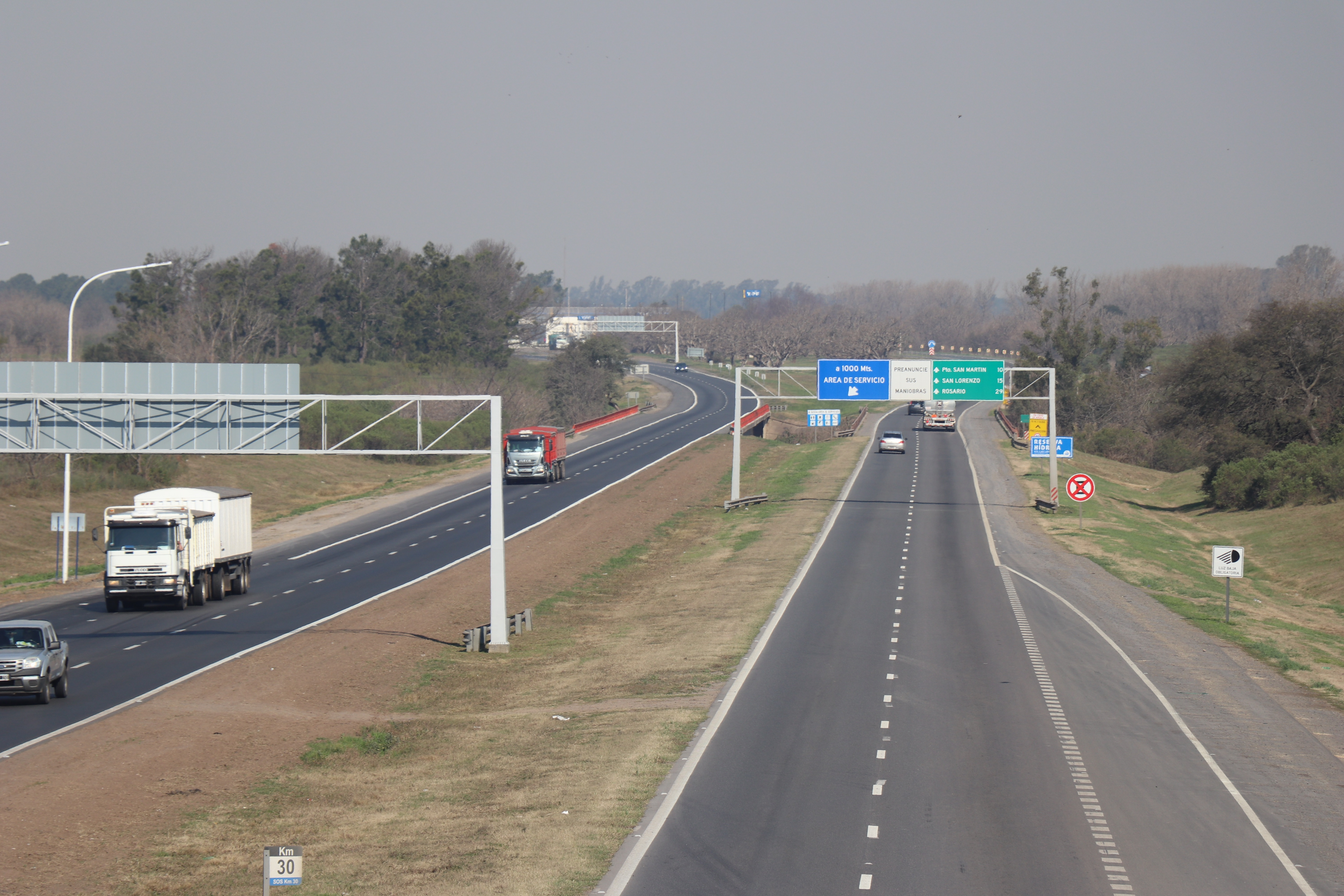 Autopista Santa Fe Rosario